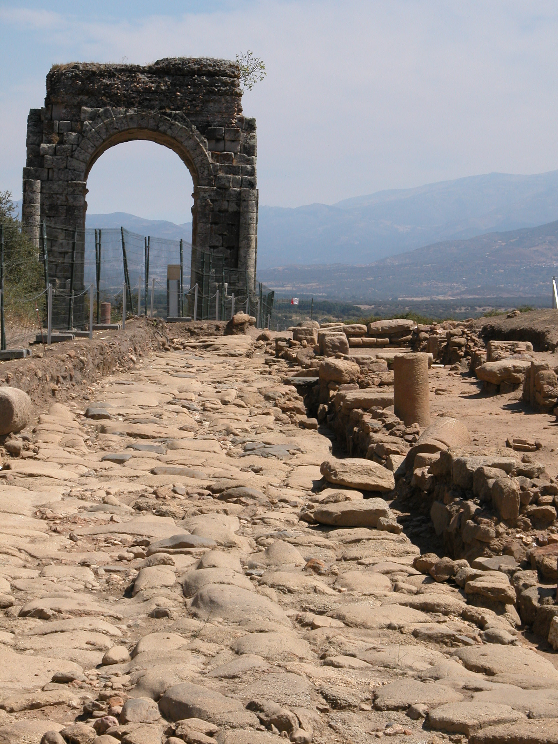 Vista general de las ruinas de la ciudad de Cáparra